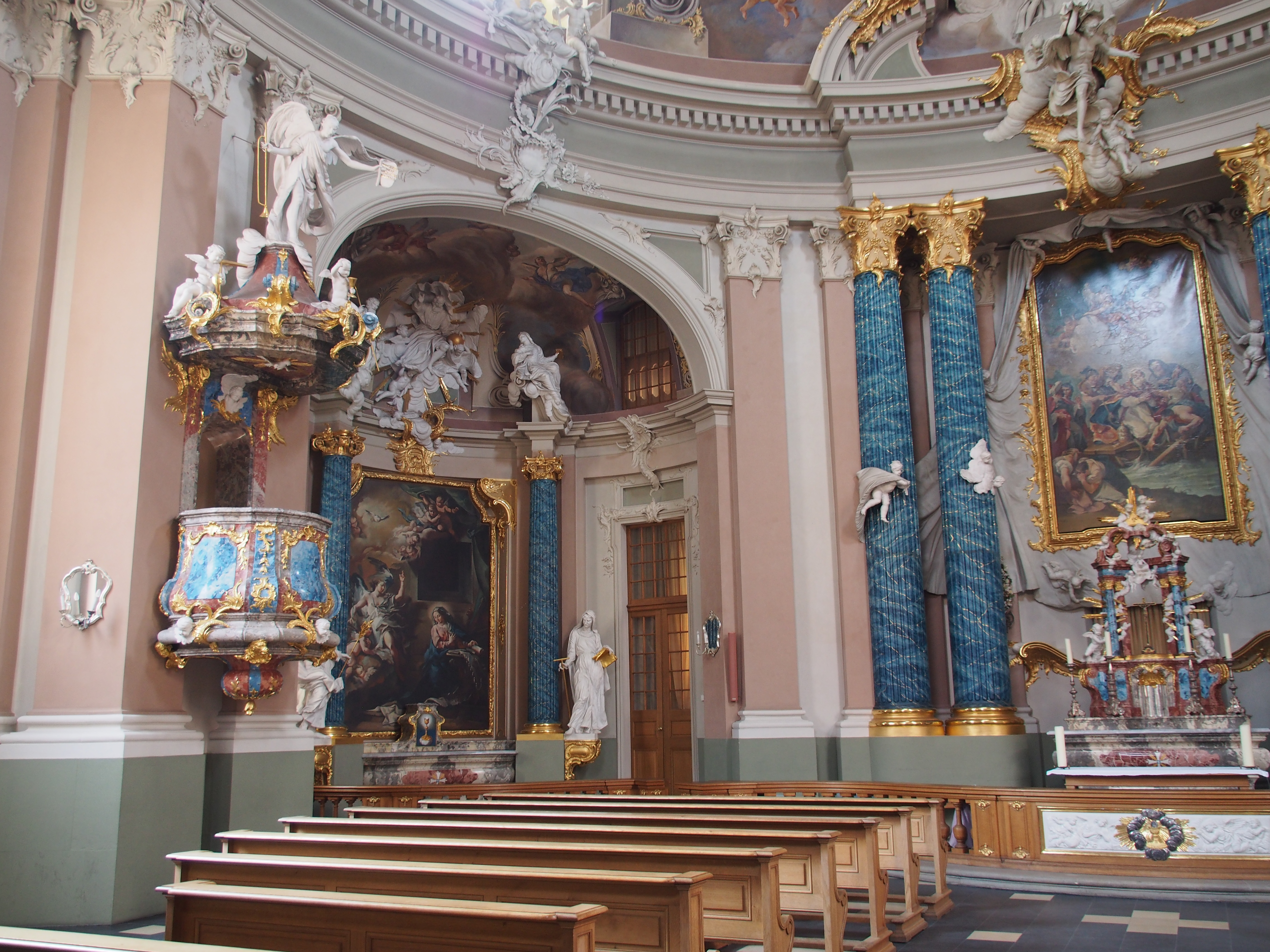 Innenansicht der St. Clemenskirche in Münster (Westfalen) mit Altar, Seitenaltar und Kanzel